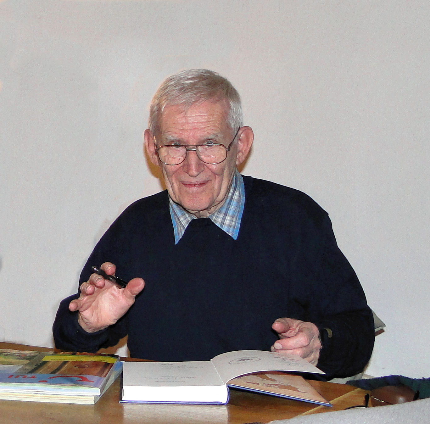 Wojciech Jacobson - polski żeglarz